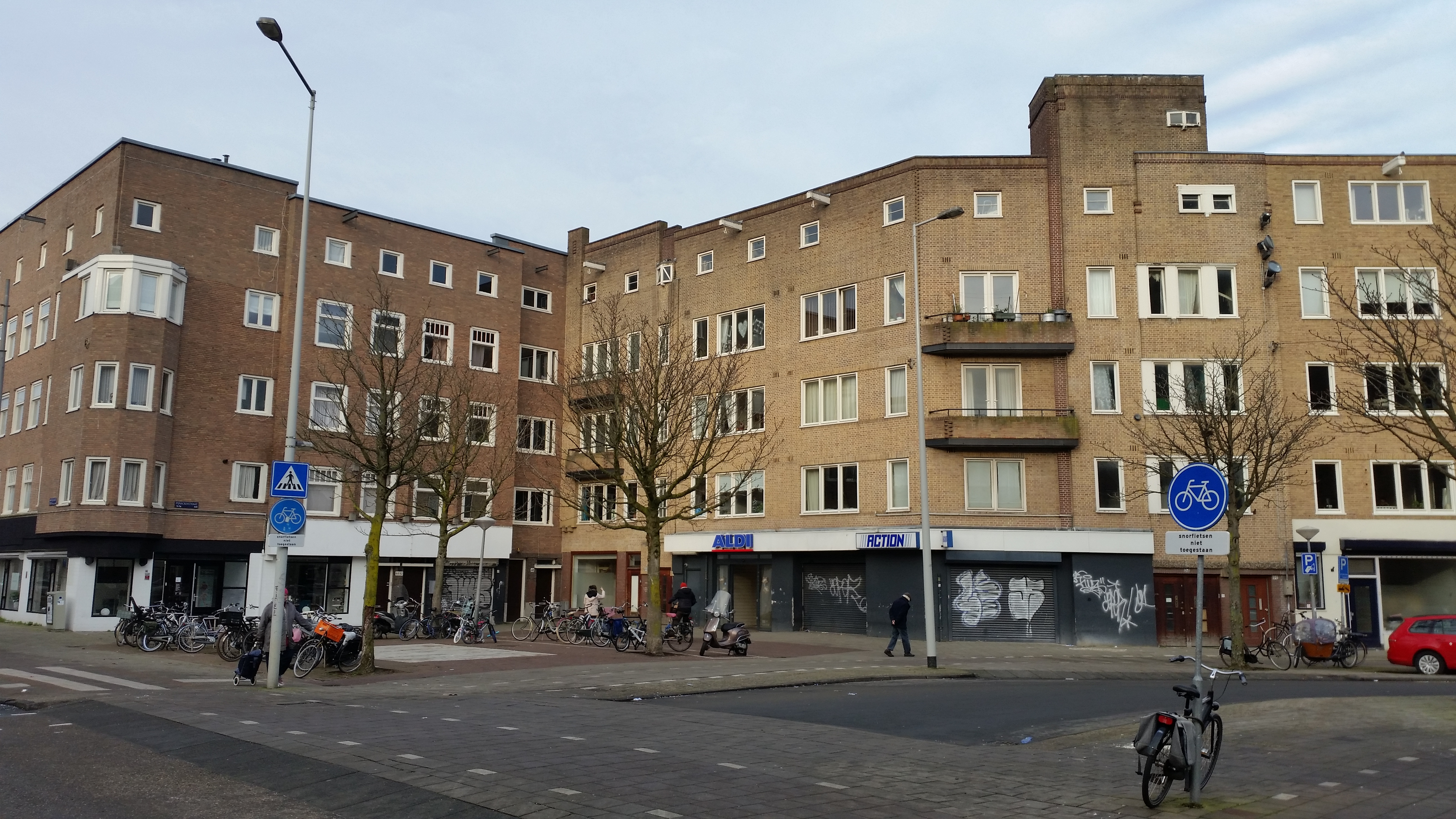 Impressies Pijnackerstraat, Amsterdam-Zuid, december 2019